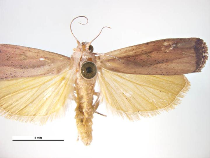 Tirathaba rufivena male